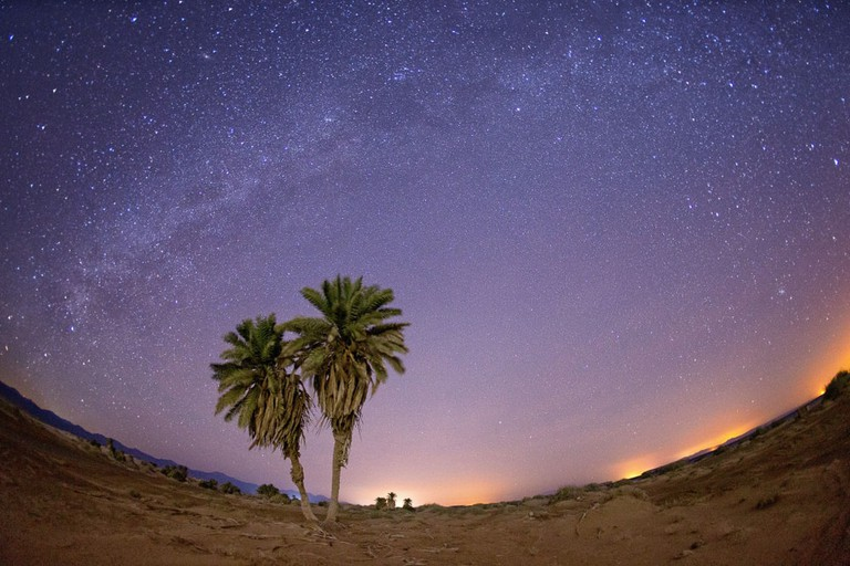 صفاء السماء في شرم الشيخ